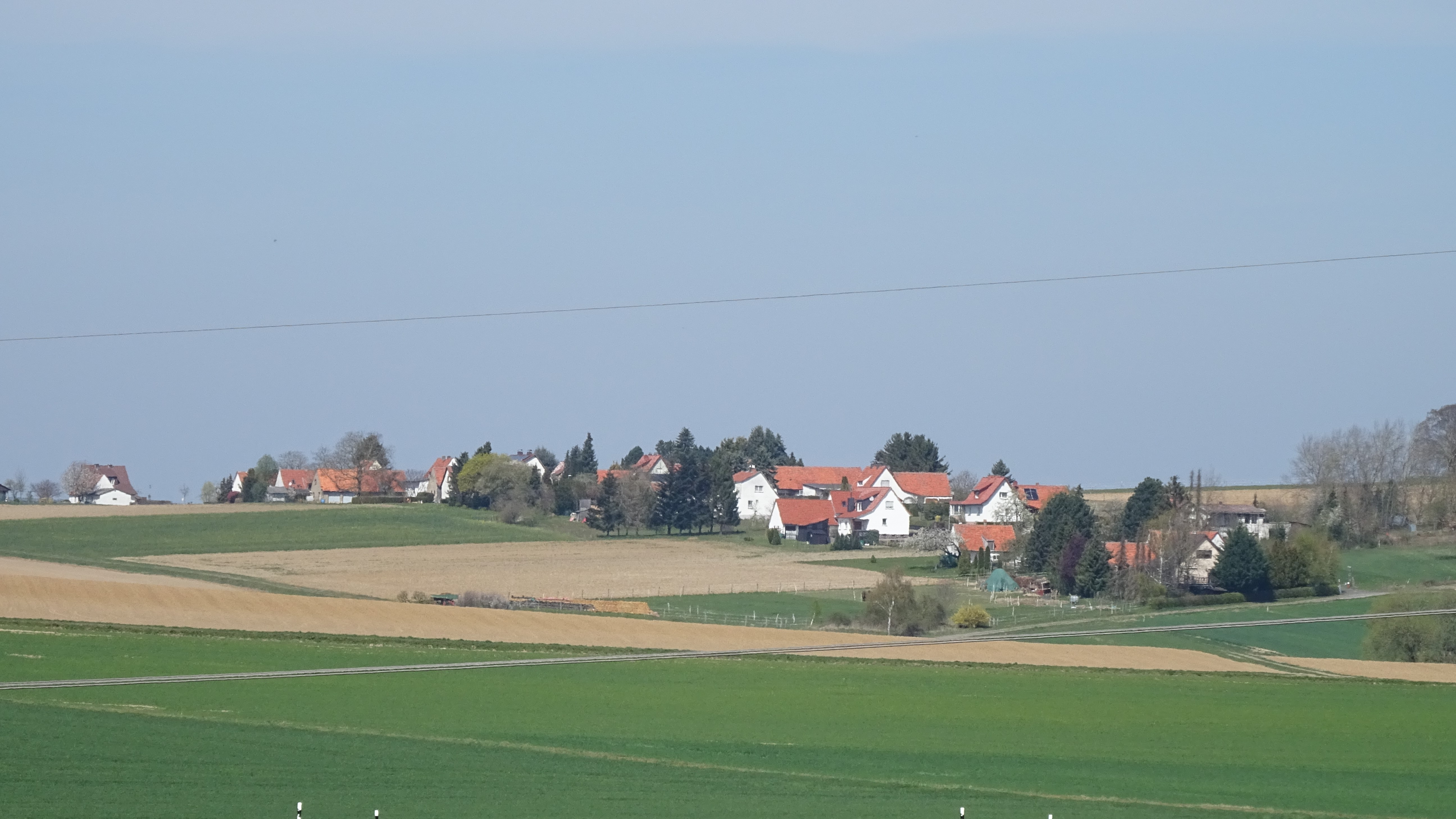 Ansicht von Süden